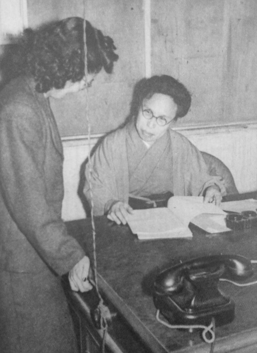 新妻イト（衆議院議員）